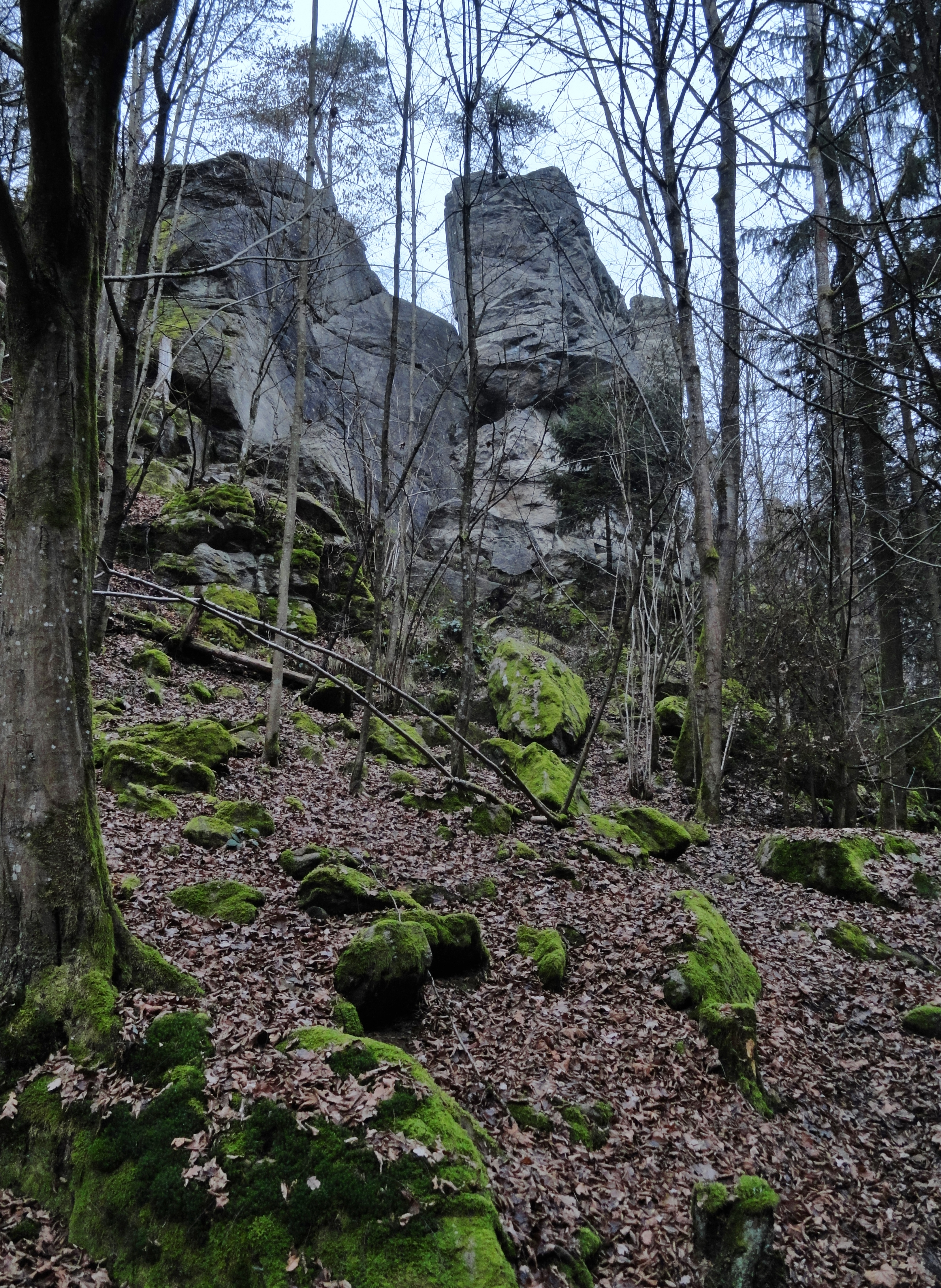 Teufelsfelsen Mitterfels